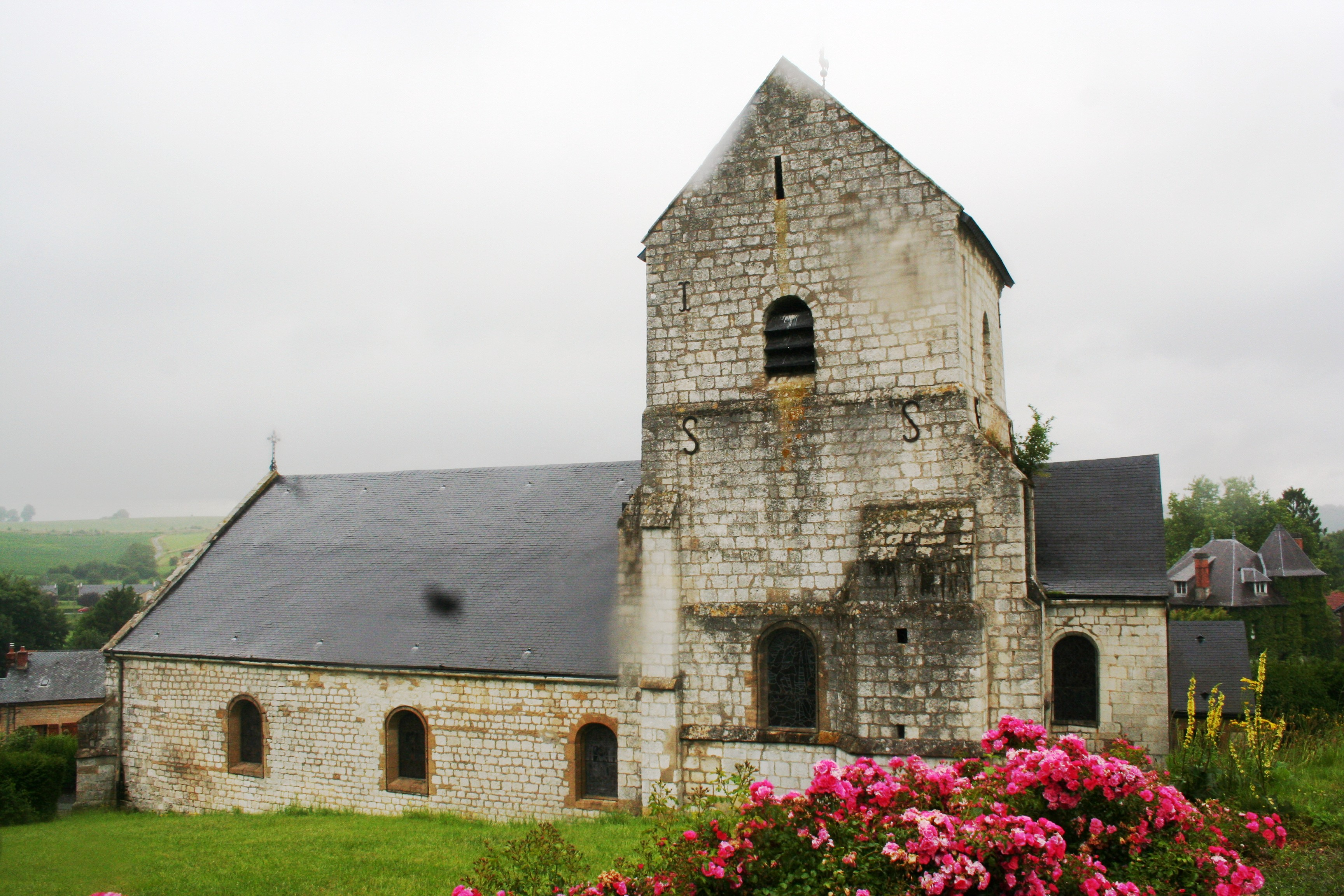 Église Saint-Martin de Poix-Terron (Ardennes, France) .